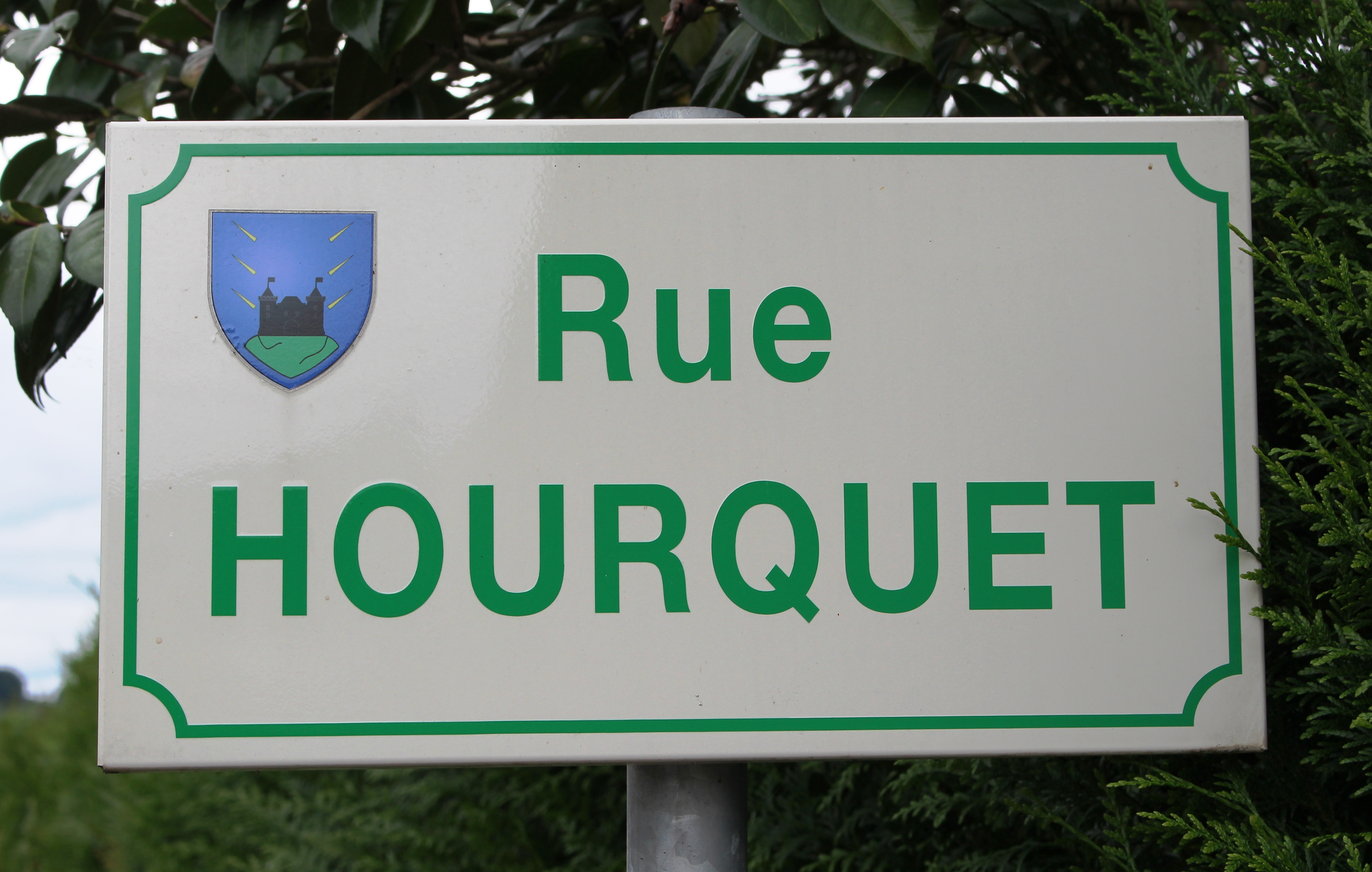 Rue du village de Paréac (Hautes-Pyrénées)